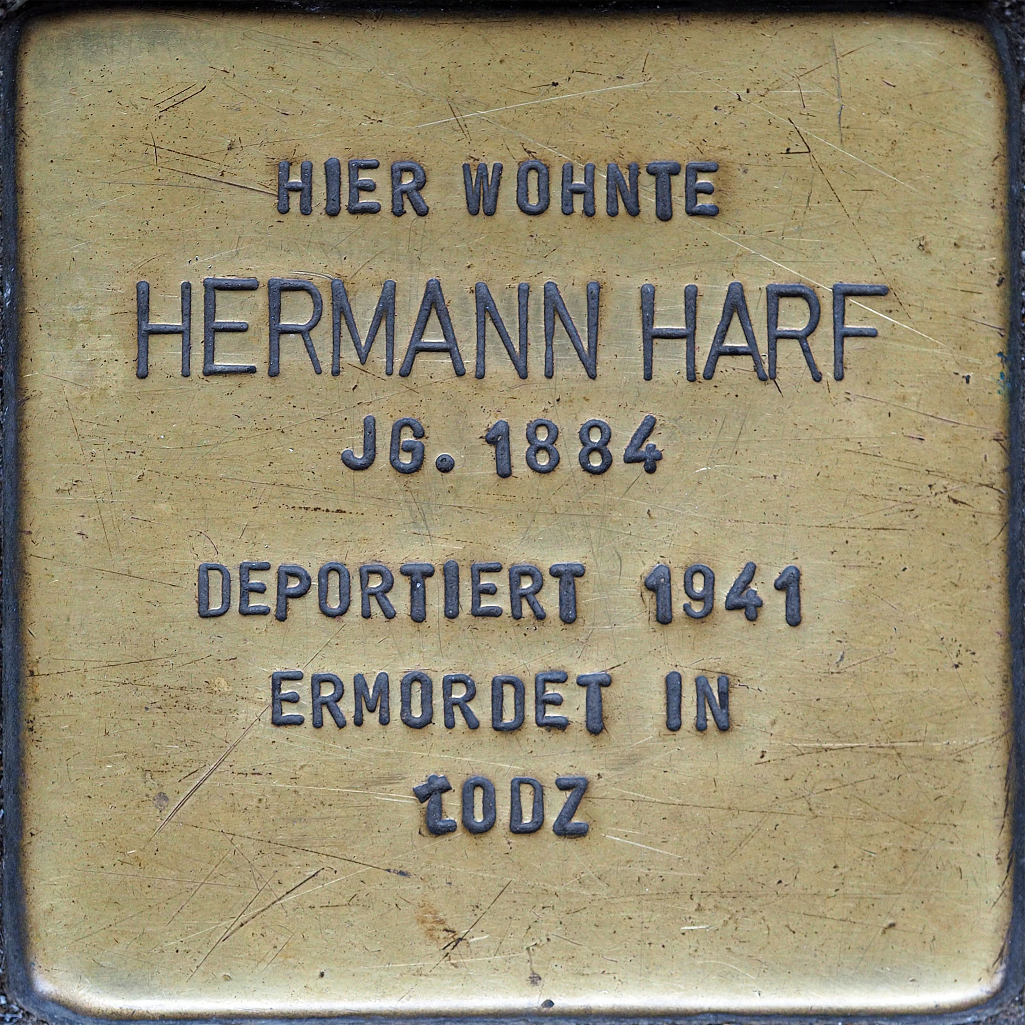 Stolpersteine MG: Harf, Hermann